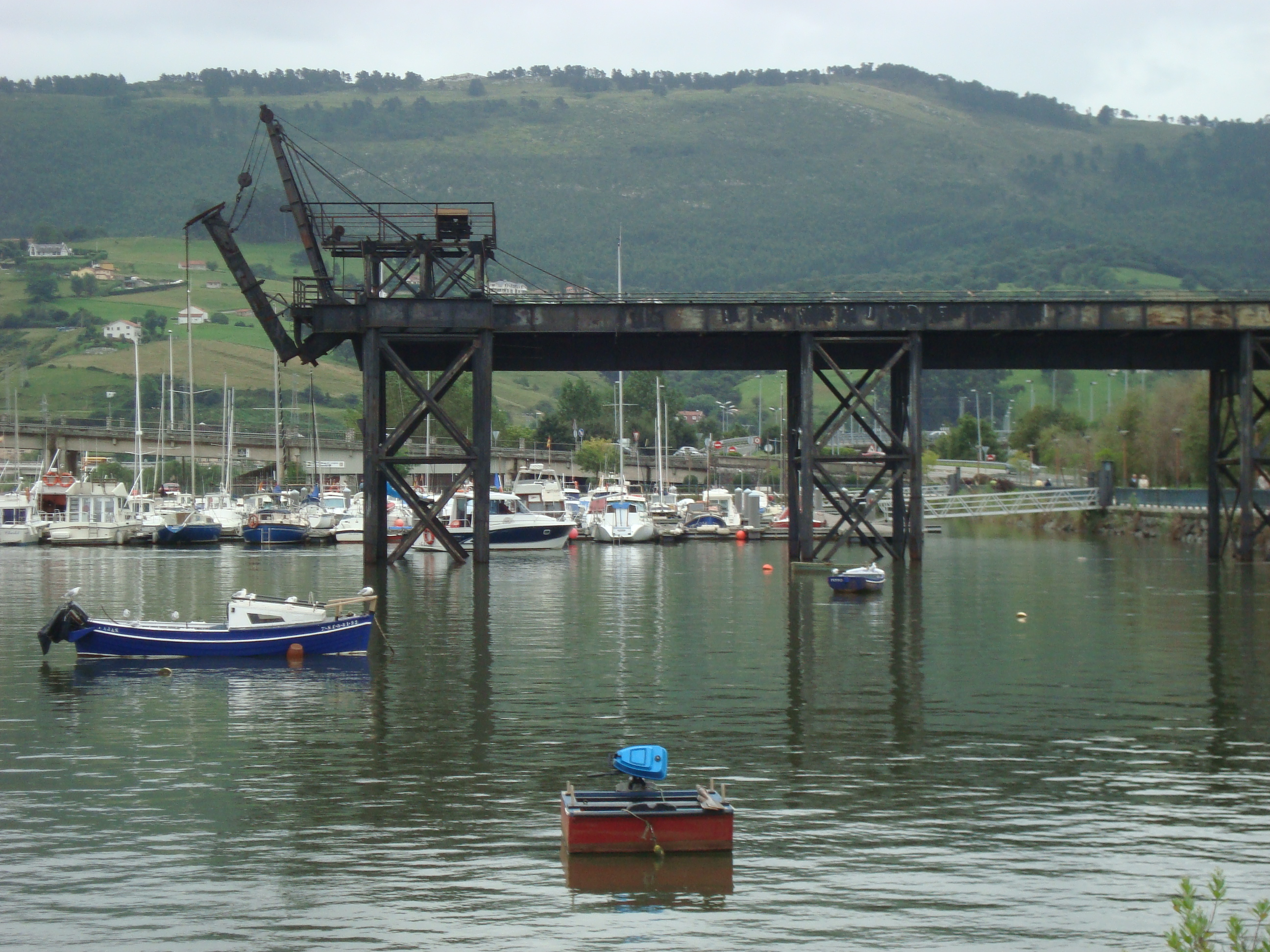 Antiguo cargadero de mineral de hierro de Orconera, conocido también como Puente de los Ingleses, en El Astillero (Cantabria, España).